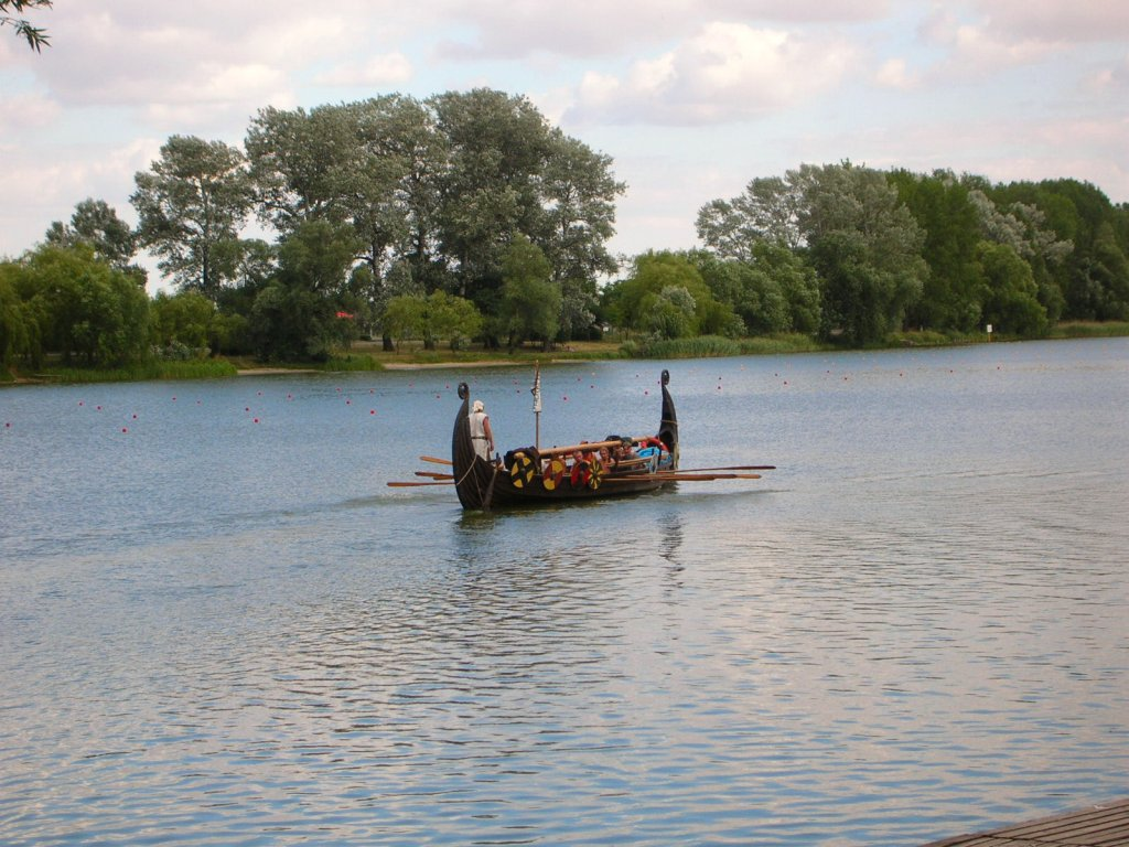 Na jeziorze Gopło